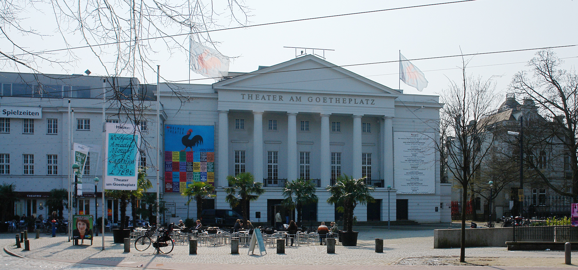 Theater am Goetheplatz in Bremen. Rechts die Villa Ichon Das abgebildete Objekt ist ein geschütztes Kulturdenkmal in der Freien Hansestadt Bremen, mit der Nr. 1722 beim Landesamt für Denkmalpflege registriert.